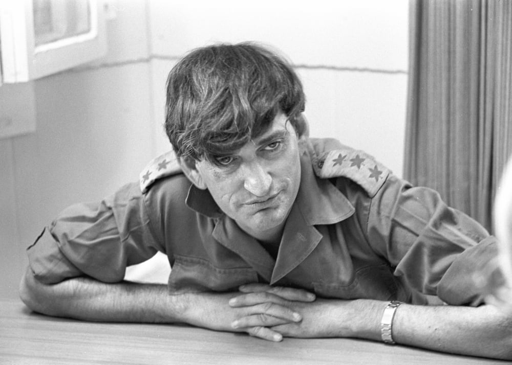 Depicted person: Avigdor Ben-Gal – Israeli general